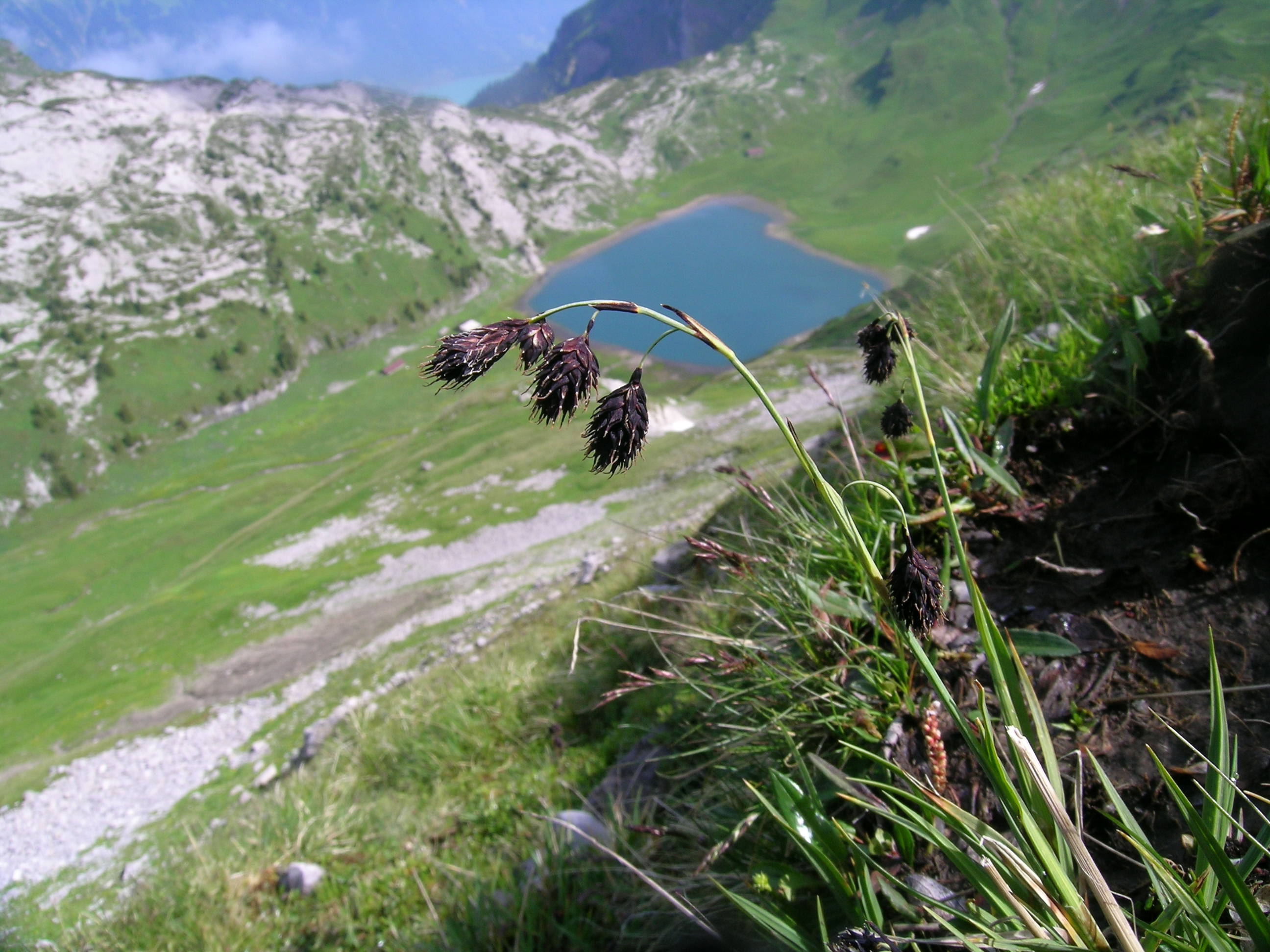 Carex atrofusca, Schynige Platte (Kanton Bern, Schweiz)